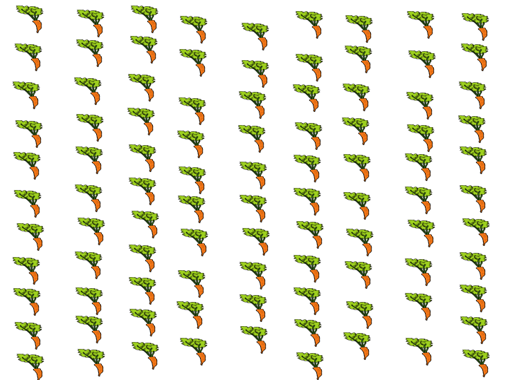 Standraumverteilung